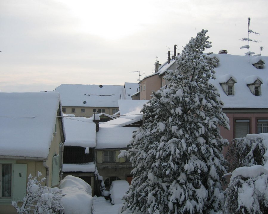 Les toits de la ville sous la neige après l'abondante chute de neige du 4 mars 2006.